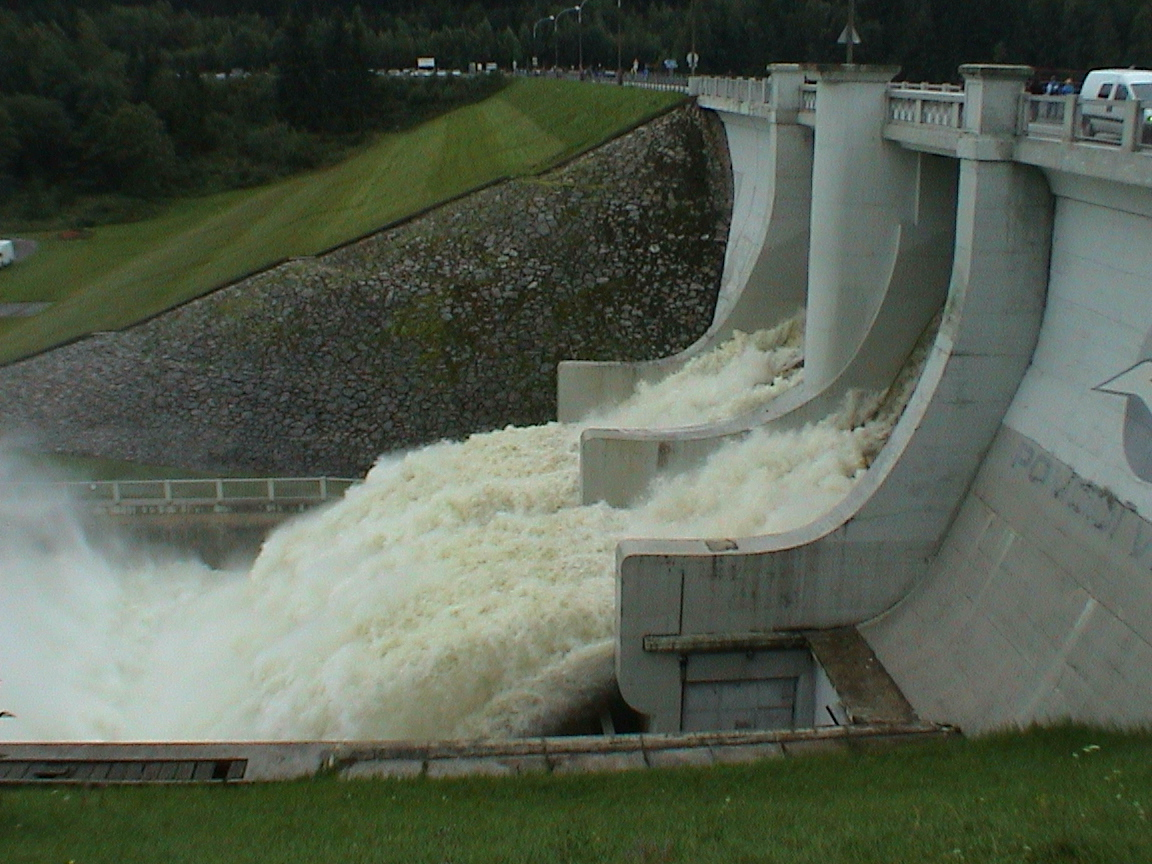 Vodní nádrž Lipno